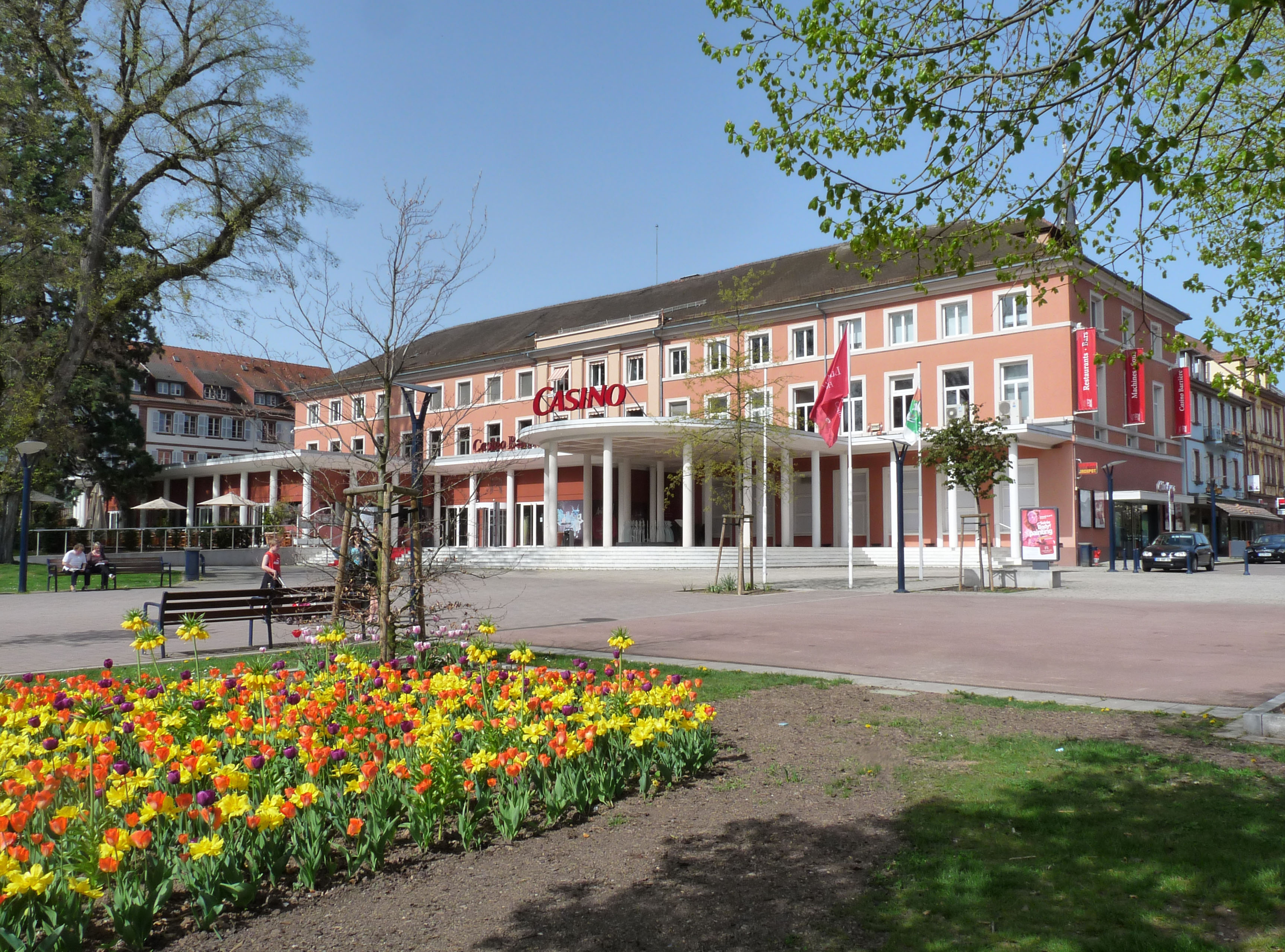 Casino de Niederbronn-les-Bains (Bas-Rhin).